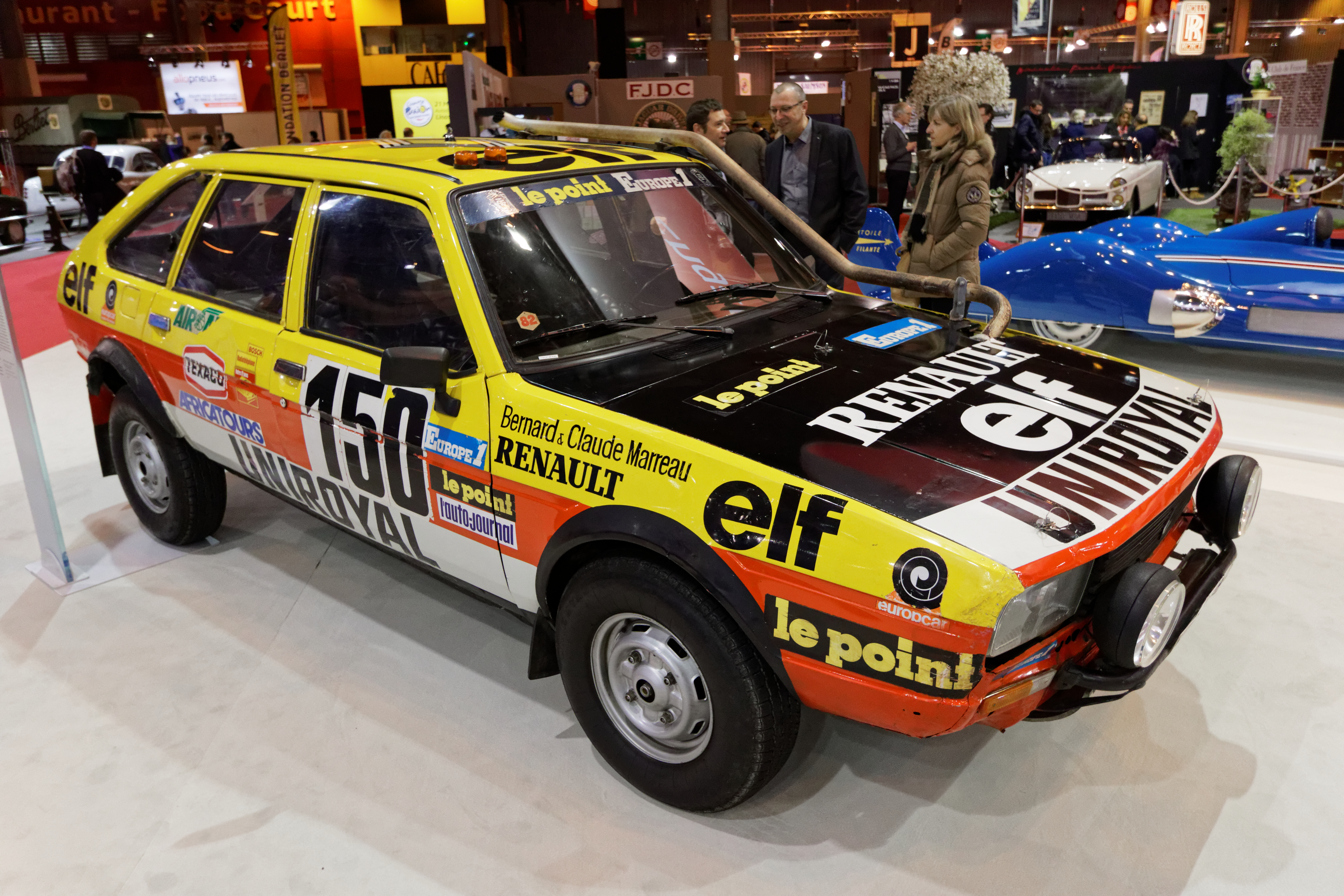 La Renault 20 Turbo 4X4 Paris-Dakar de 1982 des frères Marreau gagnante du Paris-Dakar 1982 exposée lors du salon Rétromobile 2016.